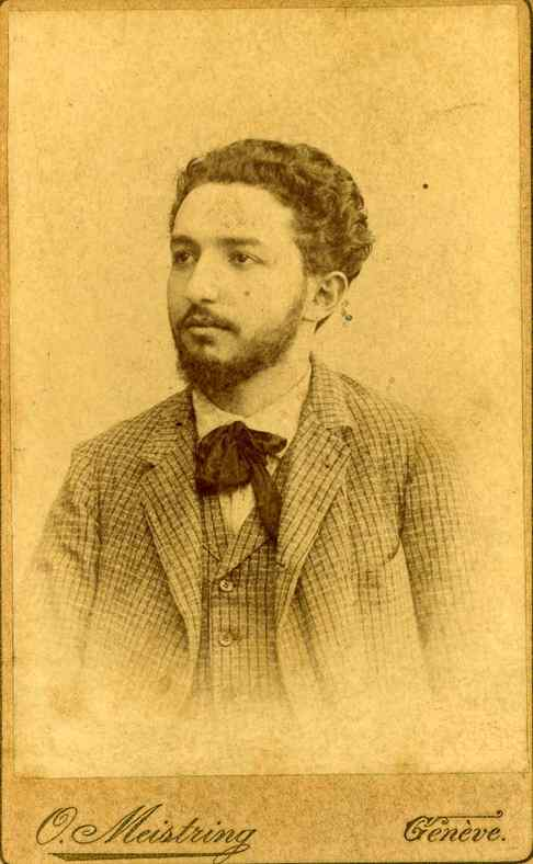 Alexander Movsesi Atabekian (né le 2 février 1868 et mort le 4 décembre 1934) était un important anarchiste arménien, auteur et éditeur d'écrits libertaires.